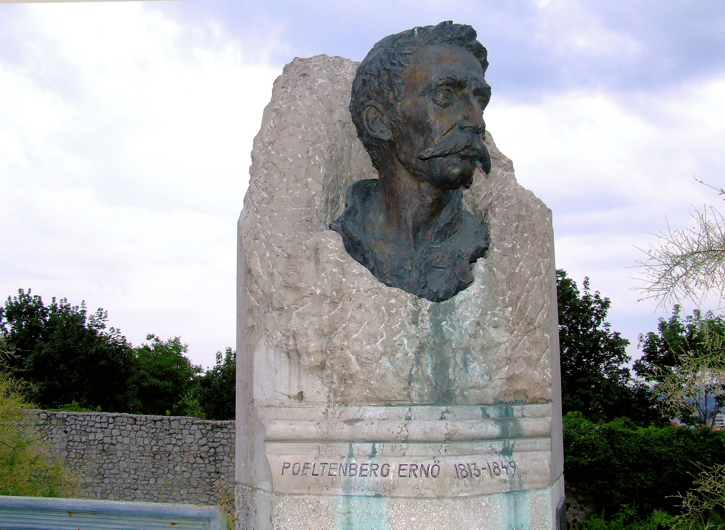 Poeltenberg Ernő honvéd vezérőrnagy, aradi vértanú szobra Pécsen. Pécs Megyei Jogú Város Közgyűlése, Pécsi Erőmű Rt., vitéz Czilchert-Mayr Aurél magyar királyi főhadnagy, Kosári Aurél műkereskedő, dr. Sasvári András közgazdász, dr. Sasváriné Szabó Klára tanító, Balogh Imre bronzöntő adománya. Trischler Ferenc szobrászművész alkotása (1994)